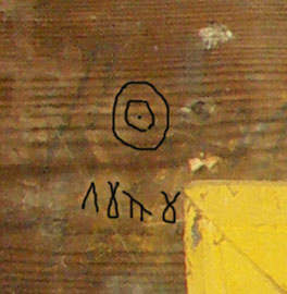 Zgrafit pe peretele de vest în tindă, semnat "Lupu" sub semn de identitate.